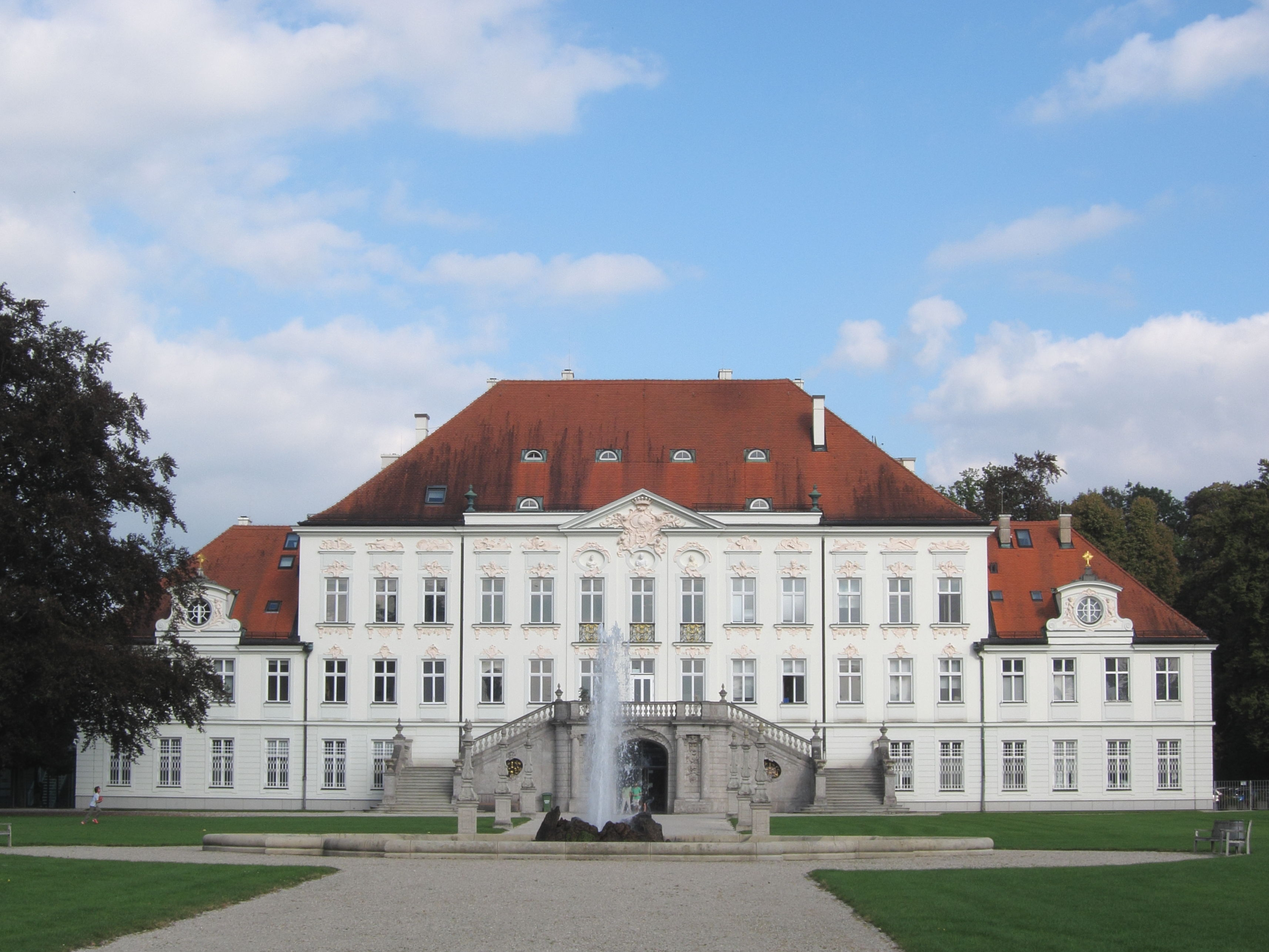 Schloss Haimhausen, Gartenseite